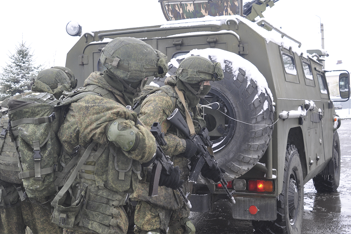 Тактико-специальное учение 22-й отдельной гвардейской бригады специального назначения (22 гв. обрспн) Авар: Anti-terrorist exercise of russian 22nd Separate Guards Special Purpose Brigade.